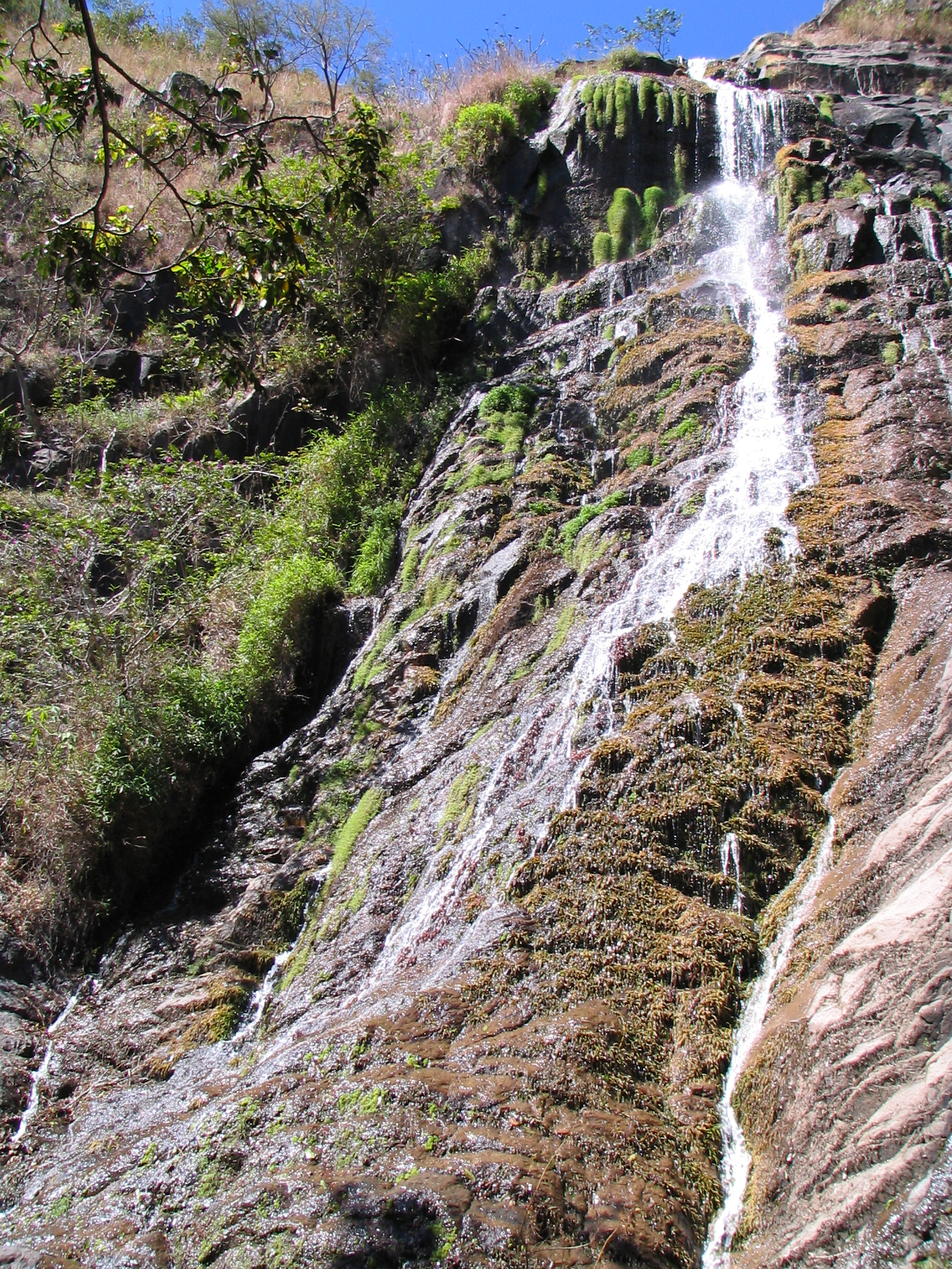 Fotografía de El Chorrón Blanco